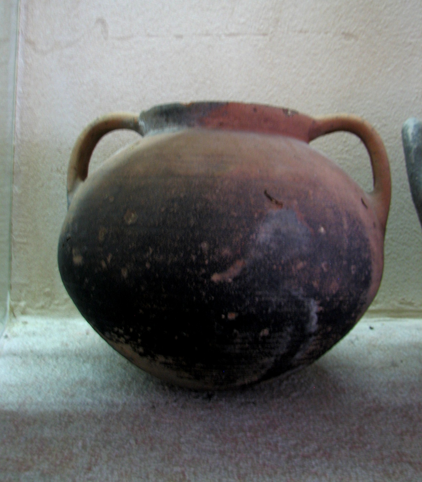 The Ma'agan Michael Ship is a 5th-century BC merchantman discovered off the coast of Ma'agan Michael, Israel, in 1985. הספינה העתיקה ממעגן מיכאל, היא ספינת סוחר פניקית מעץ מסוף המאה החמישית לפנה"ס שהתגלתה ב-1985 בים במרחק 70 מטר מחוף קיבוץ מעגן מיכאל בעומק של שני מטר סיר בישול, סימני האפר השחור על הסיר